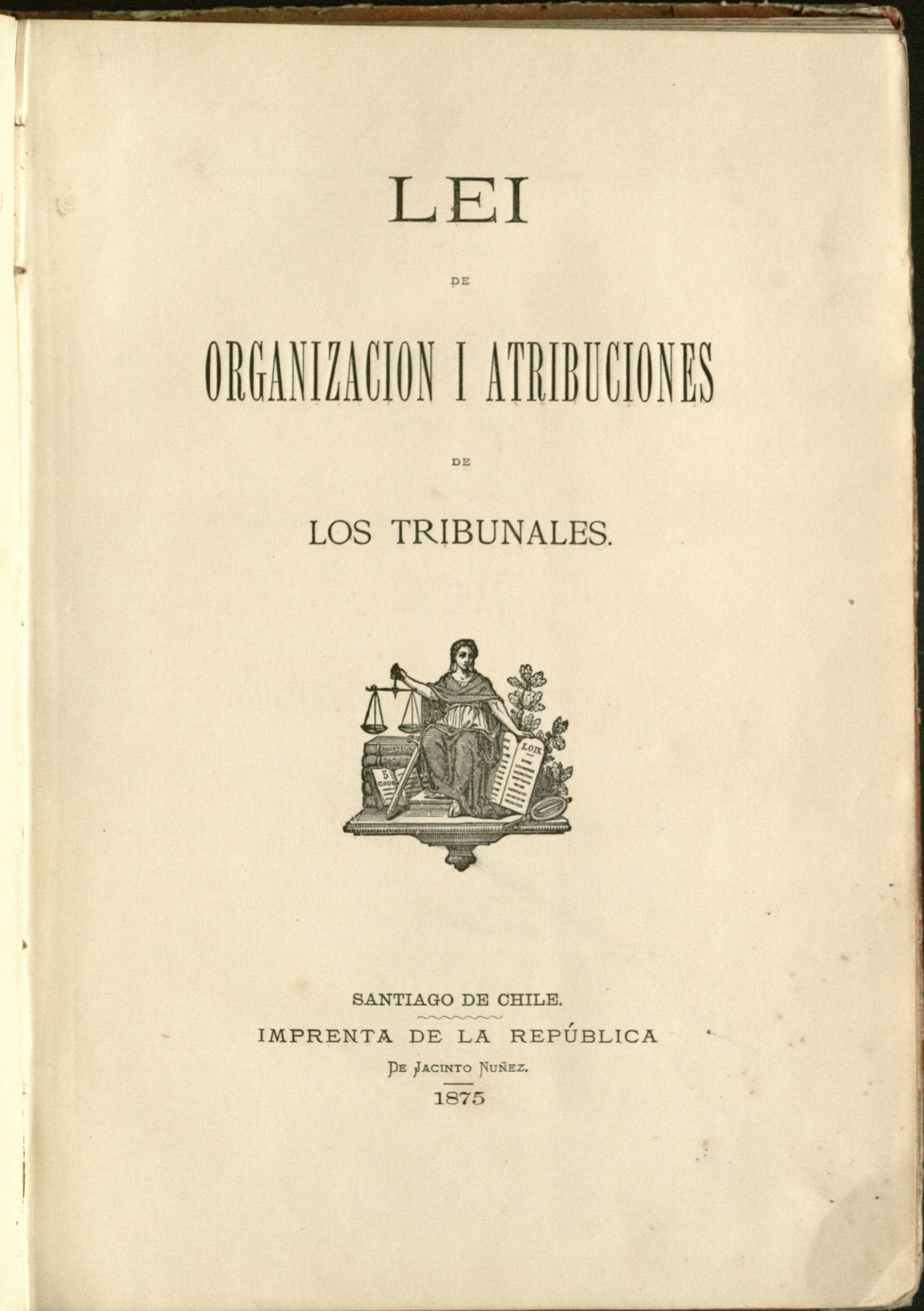 Source: Chile. Lei de organización i atribuciones de los tribunales (Santiago de Chile: Imprenta de la República de Jacinto Nuñez, 1875); 25 cm. cALL # LA Chile 26J8 1875.